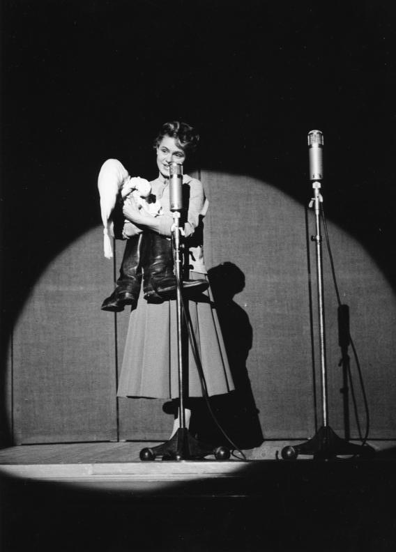 Gastspiel in Düsseldorf, 19.10.1956 Kabarett "Die Stachelschweine" Berlin Szene: Schlaflied Text: Rolf Ulrich